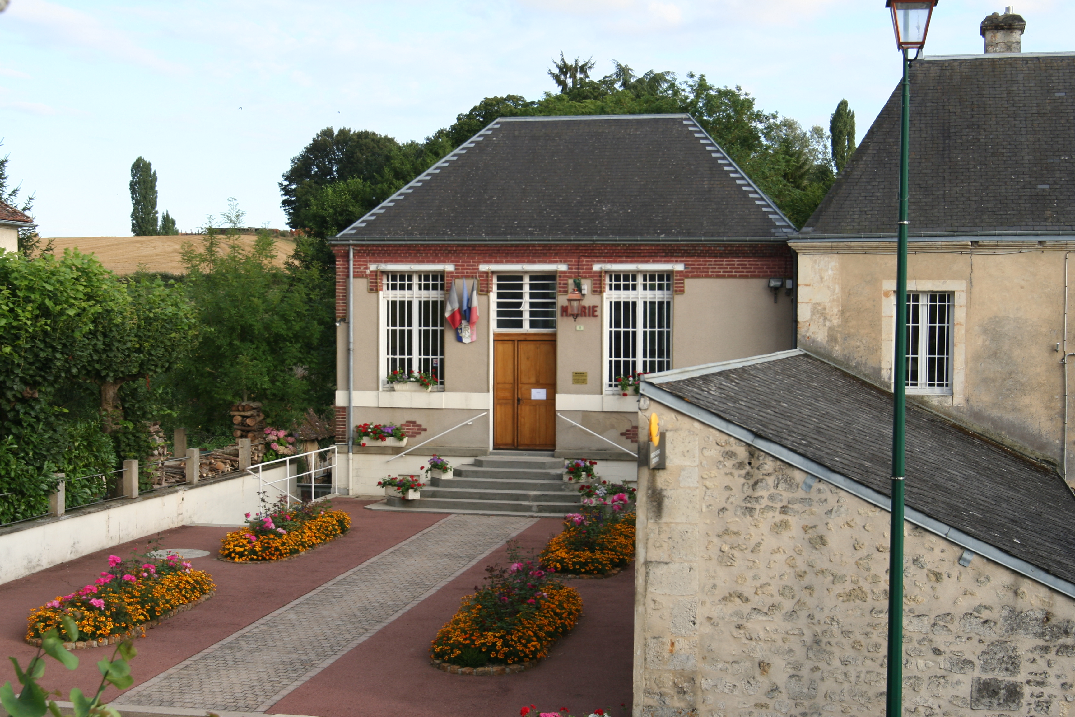 La mairie du Pin-la-Garenne.